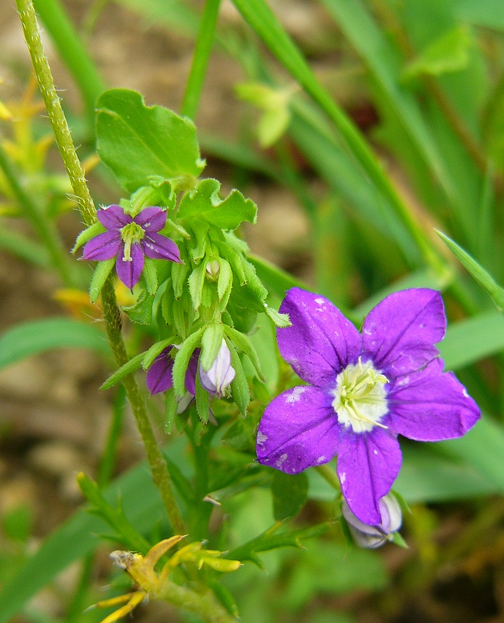 Vergleich kleiner (links) und großer (rechts) Frauenspiegel